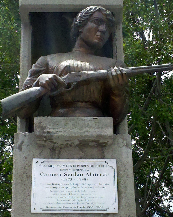 Monumento a Carmen Serdán Alatriste, Puebla, México. Parque entre la 10 oriente/12 oriente, y 6 norte/Boulevard 5 de mayo.